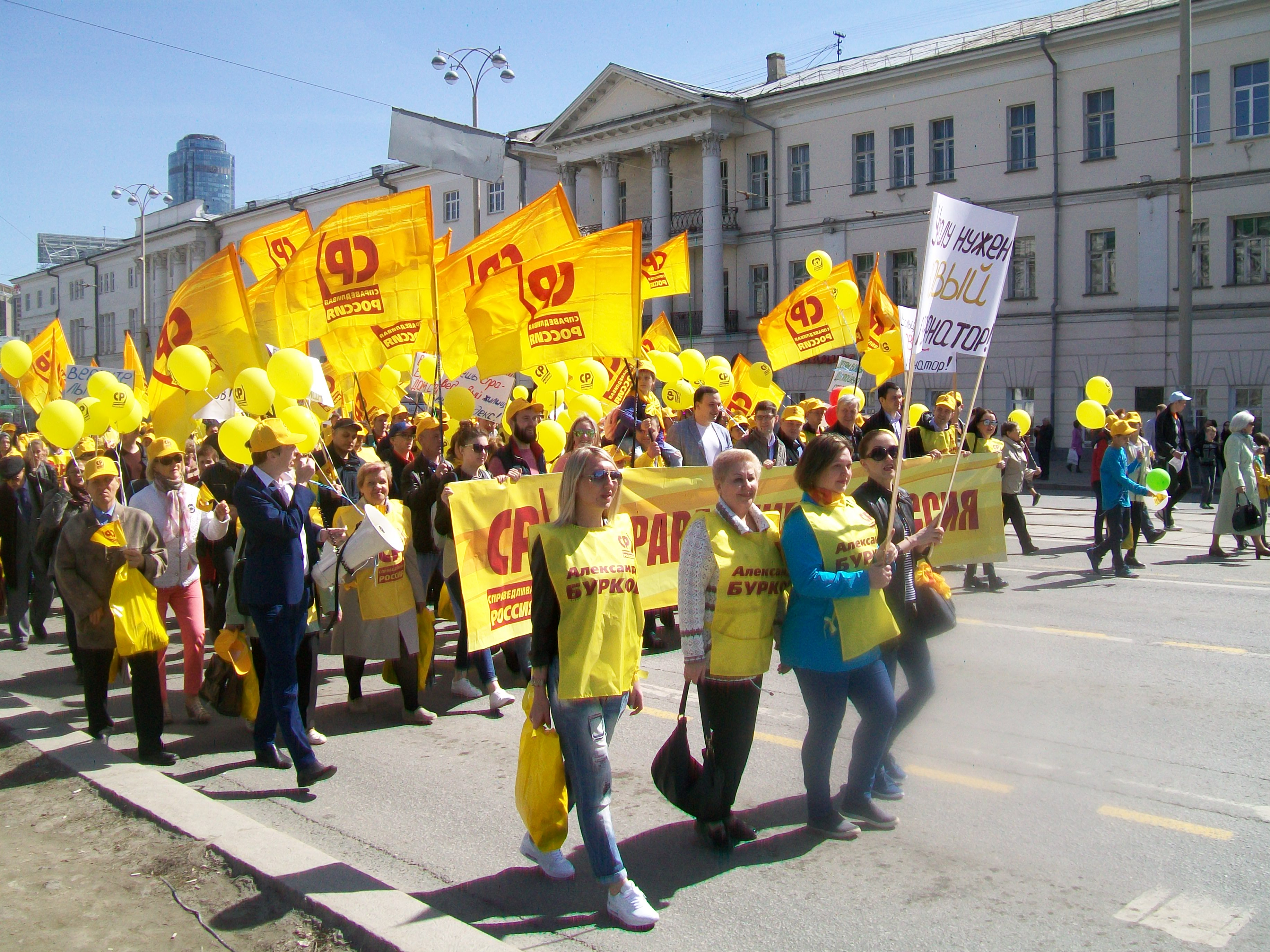 Антигубернаторское шествие Справедливой России в Екатеринбурге, 1 мая 2017 года